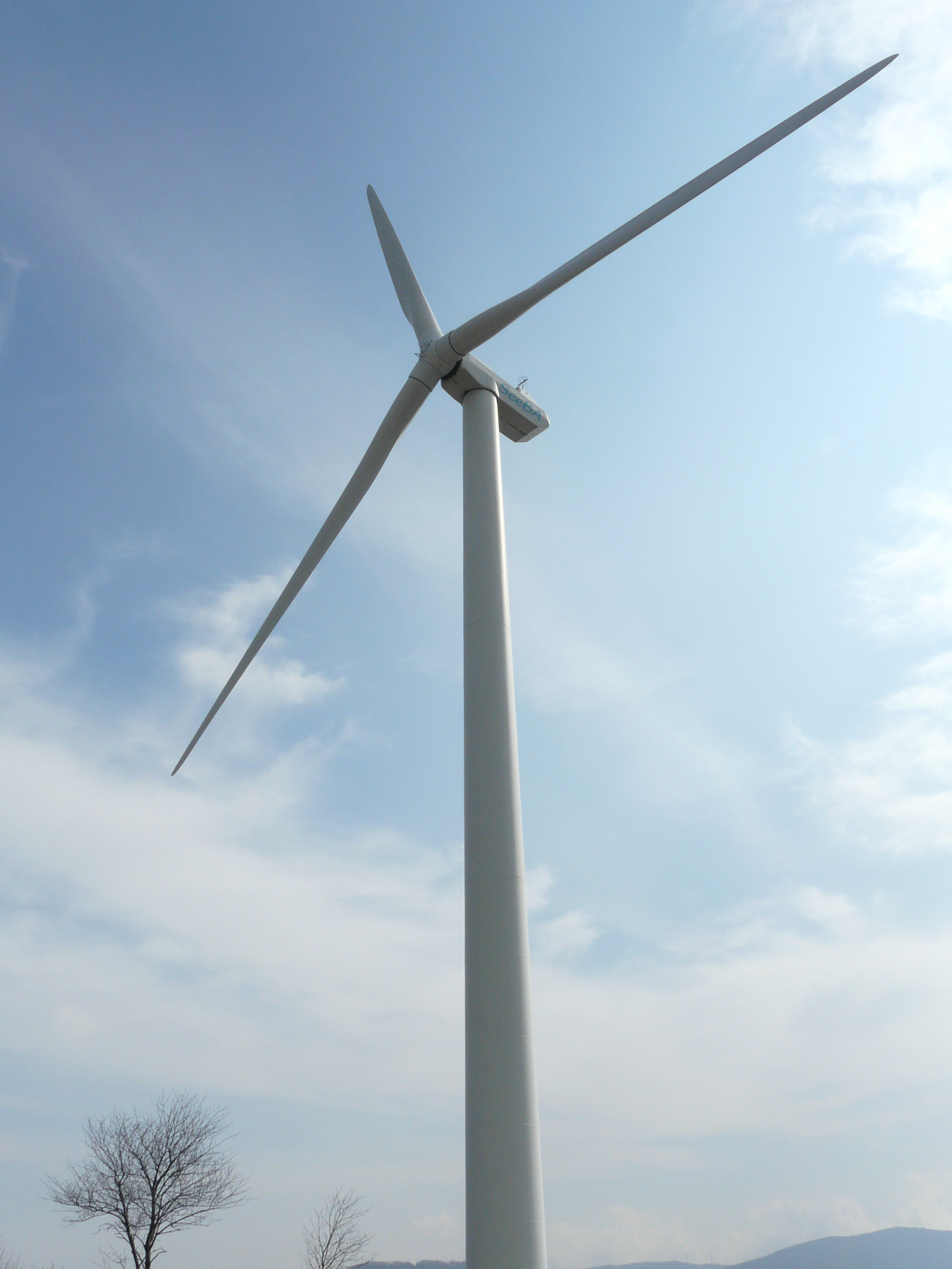 Impianto ad energia eolica presso Osiglia, Liguria, Italia